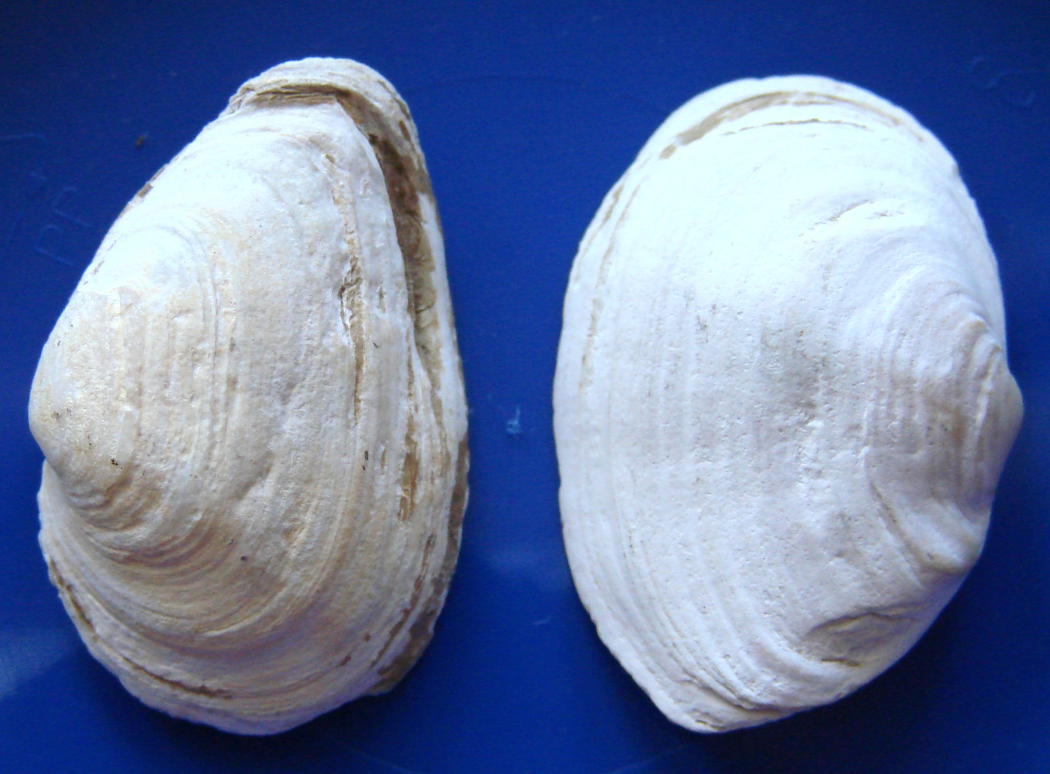 Mya arenaria